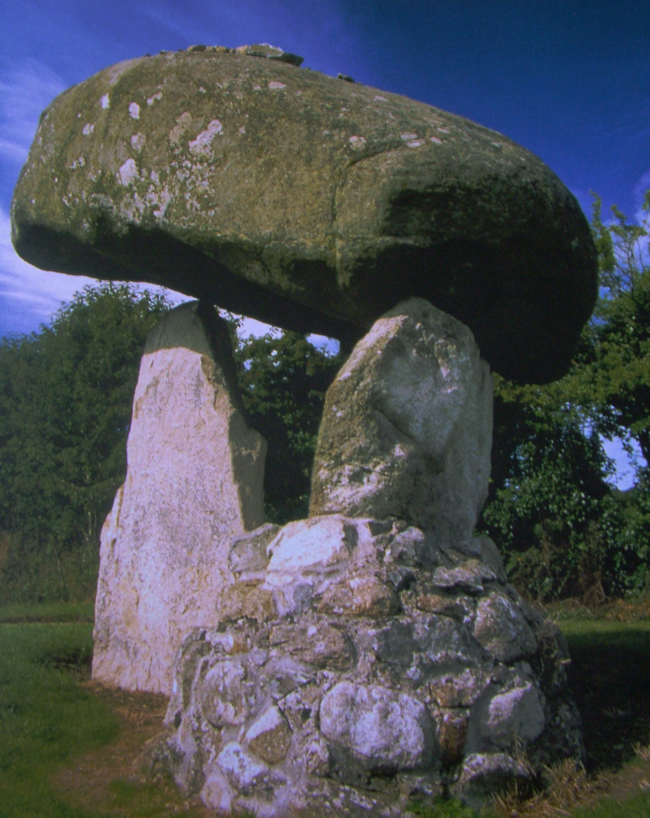 Proleek, Írország: dolmen (Co Louth)